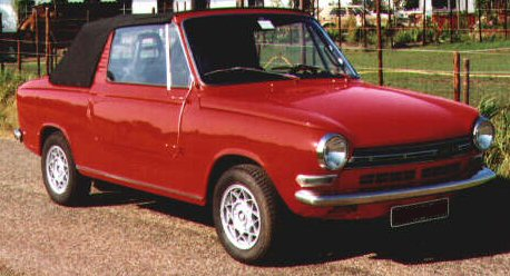 Havas Daf 55 Beachcomber, zelfgemaakte foto destijds door de eigenaar / restaurateur(astetter). Auto staat nu in het Dafmuseum in Eindhoven. Originele kleur was Mimosa (lichtgeel), bouwjaar 1971